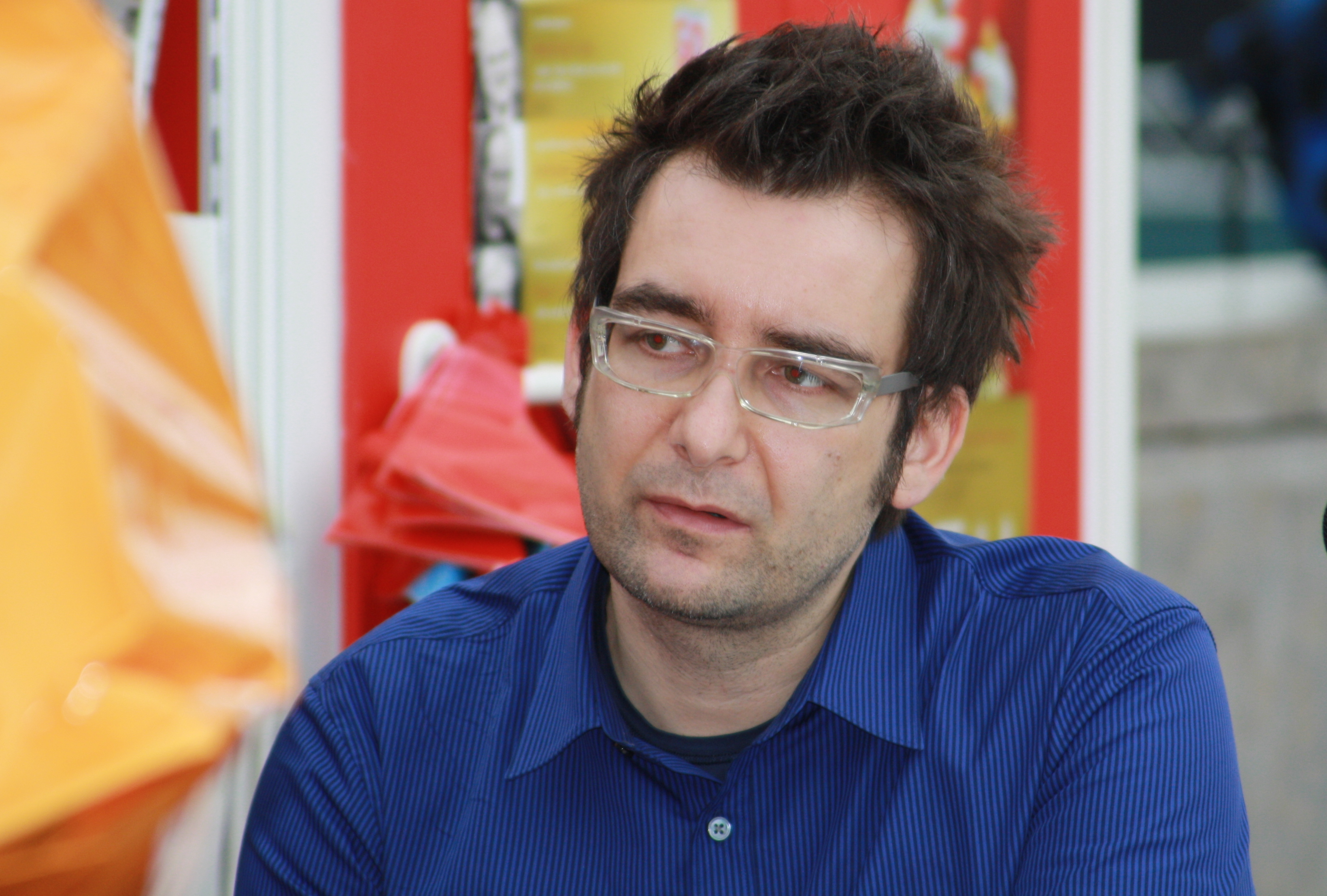 Michael Stavarič